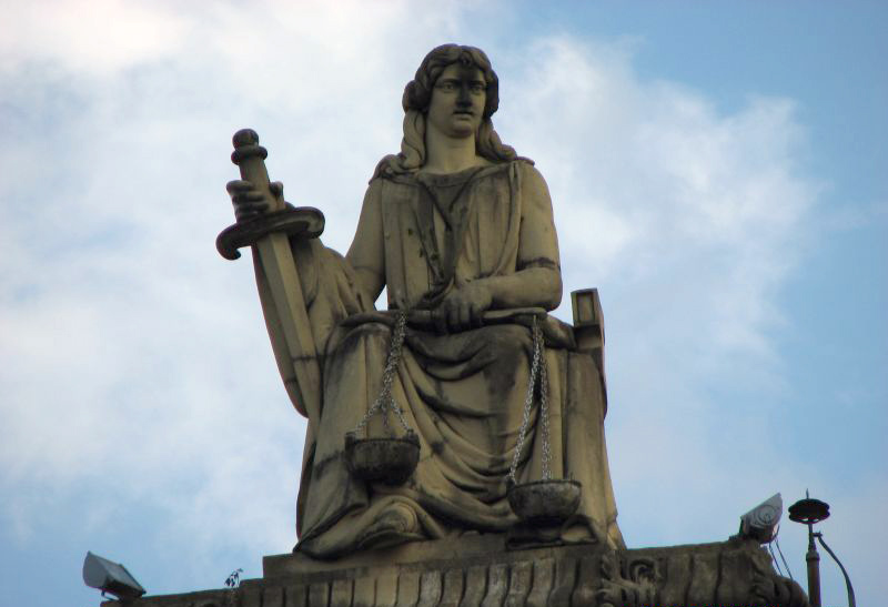 Figur der Justitia auf dem Dach des Justuluzpalasts von Manaus.